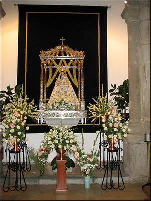 capilla de Ntra. SRa. de Gracia de ALcantarilla en la parroquia de Santiaguo el Mayor de Belalcázar (Córdoba)